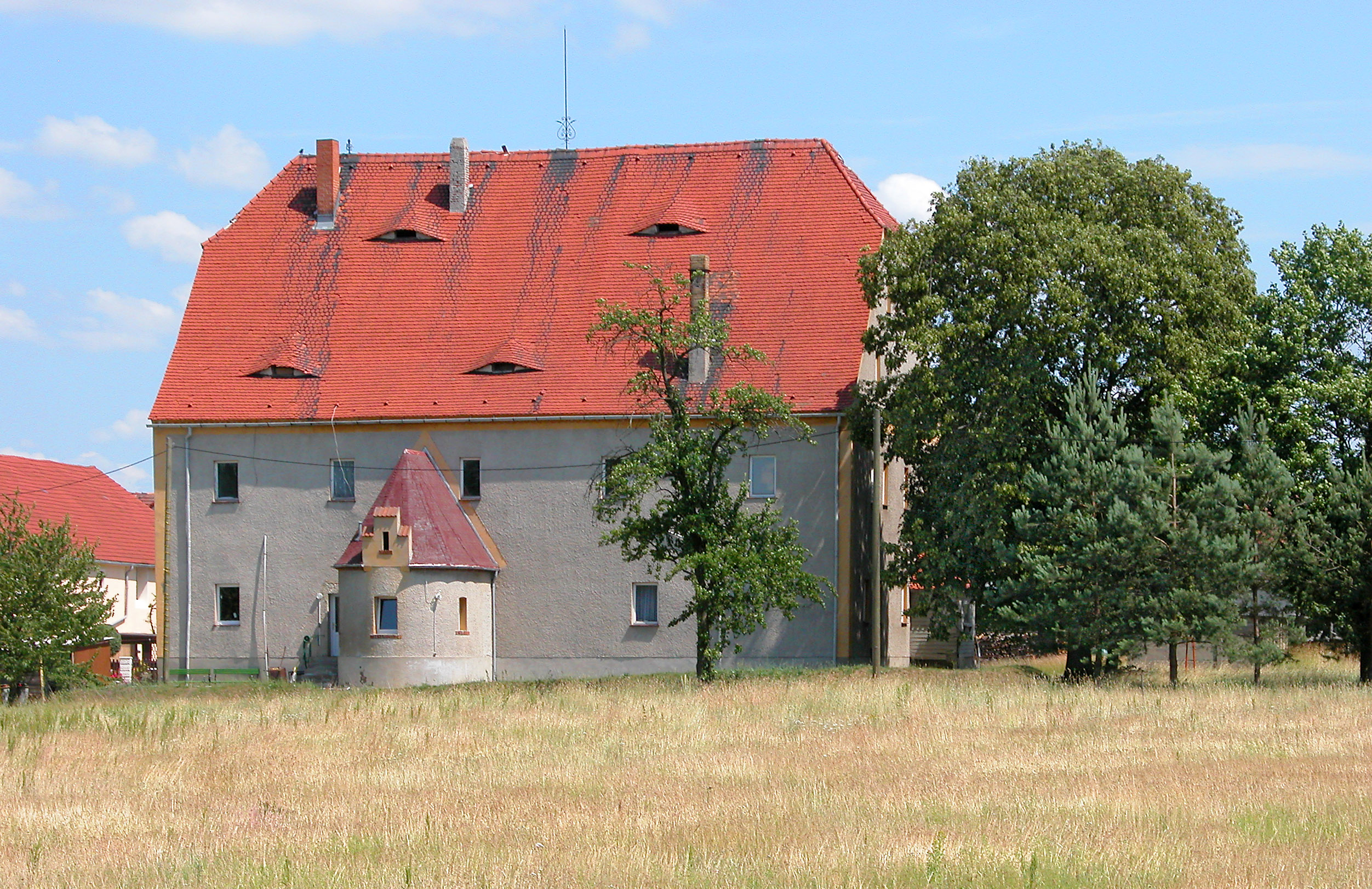 26.06.2006 01561 Tauscha (ab 2016 zu Thiendorf), Unter den Linden 1 (GMP: 51.264859,13.807476): Rittergut, Herrenhaus aus der 2. Hälfte des 17. Jahrhunderts. Sicht von Westen. [DSCN10518.TIF]20060626105DR.JPG(c)Blobelt